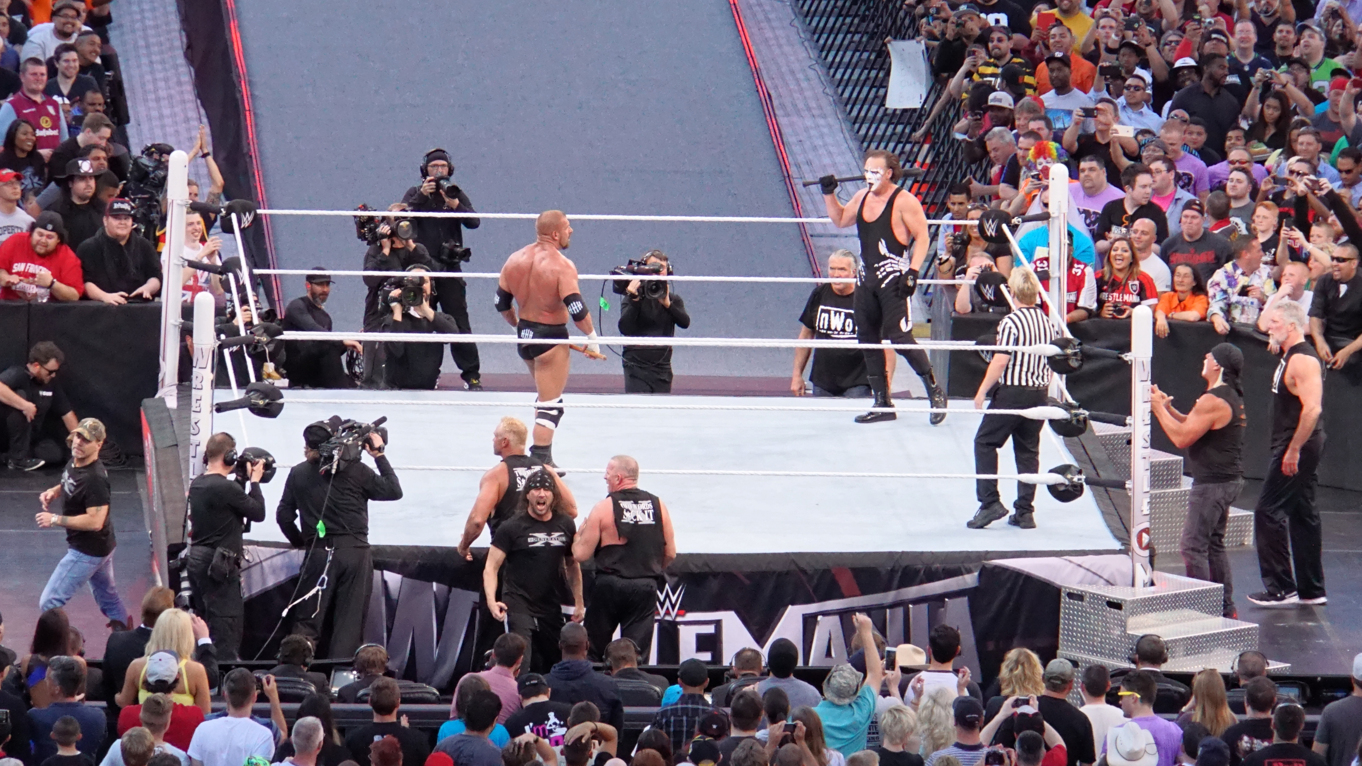 2015-03-29_17-22-05_ILCE-6000_7576_DxO